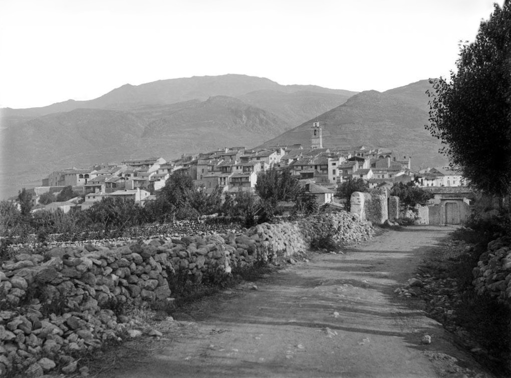 Imatge